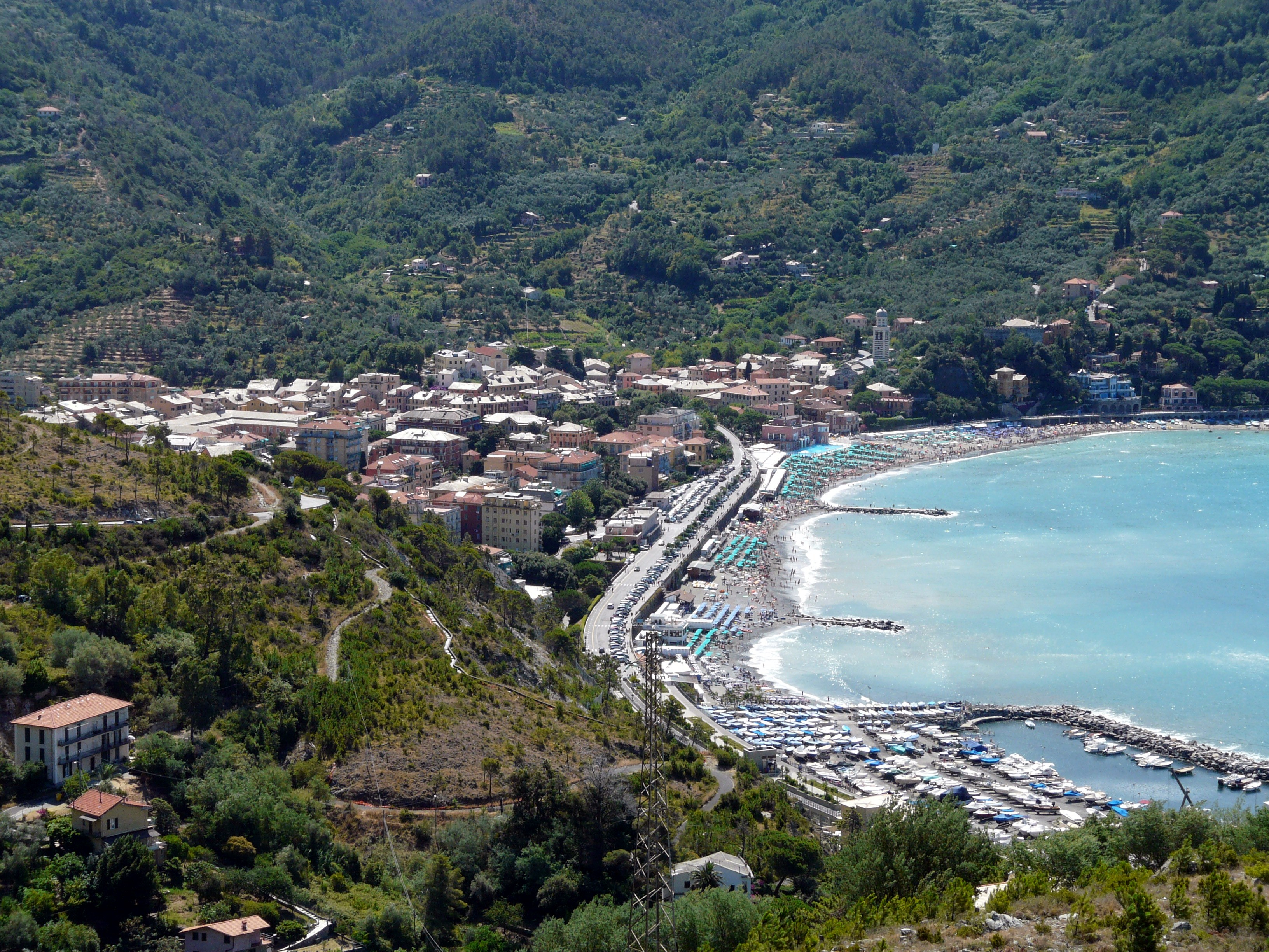 Panorama di Levanto, Liguria, Italia